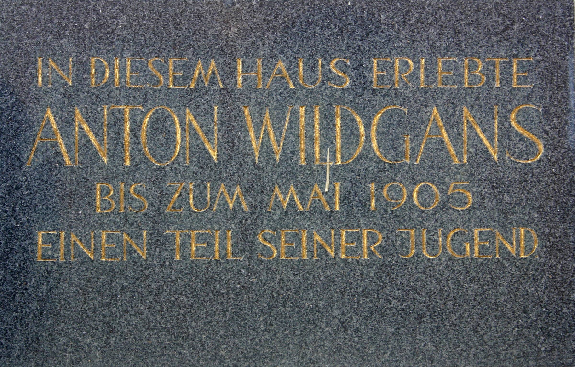 Josefstadt in Wien